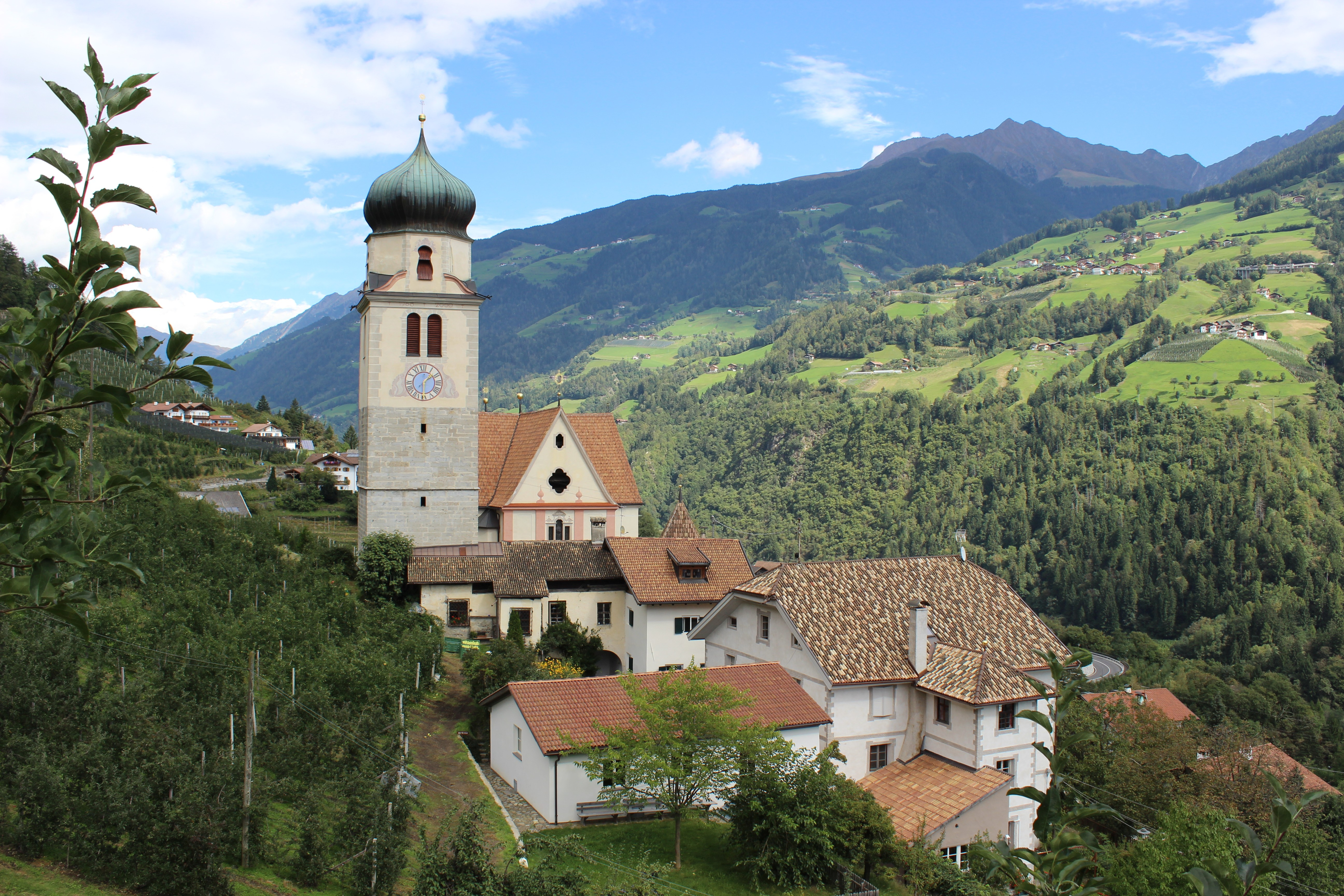 Pfarrkirche zur Schmerzhaften Muttergottes, Widum und Mesnerhaus in Riffian